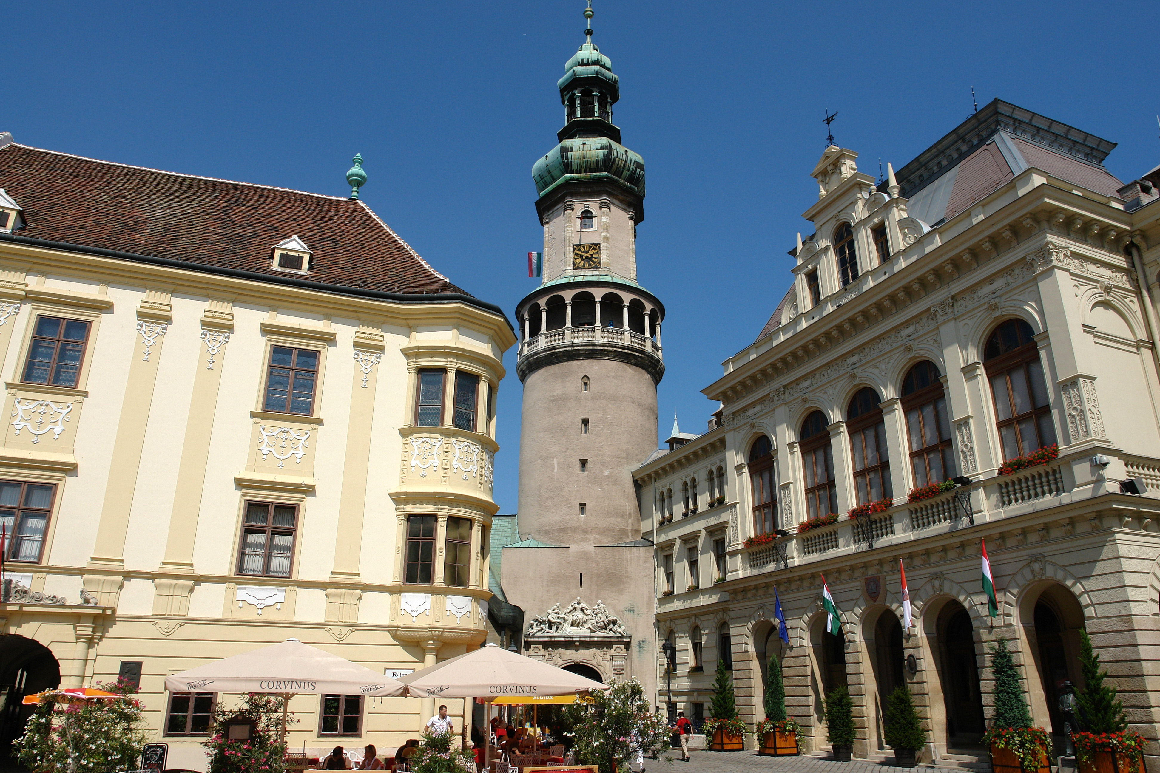 A Storno-ház, a Tűztorony és a Városháza a soproni Fő téren This is a photo of a monument in Hungary. Identifier: 4787 This is a photo of a monument in Hungary. Identifier: 4779 This is a photo of a monument in Hungary. Identifier: 4780